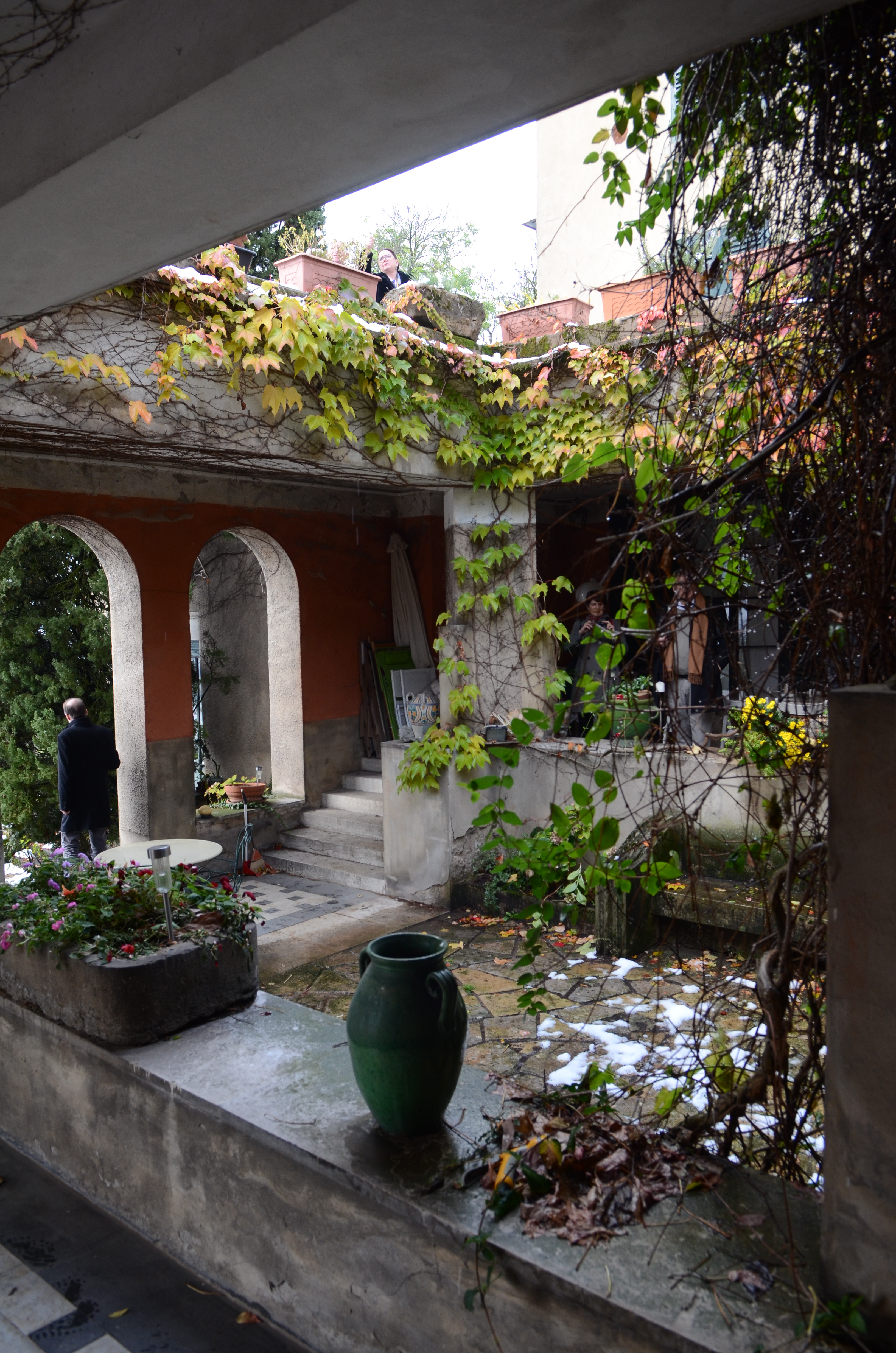 Villa Gros, construite par Tony Garnier, située route de Limonest à Saint-Didier-au-Mont-d'Or, dans le Rhône, en France.